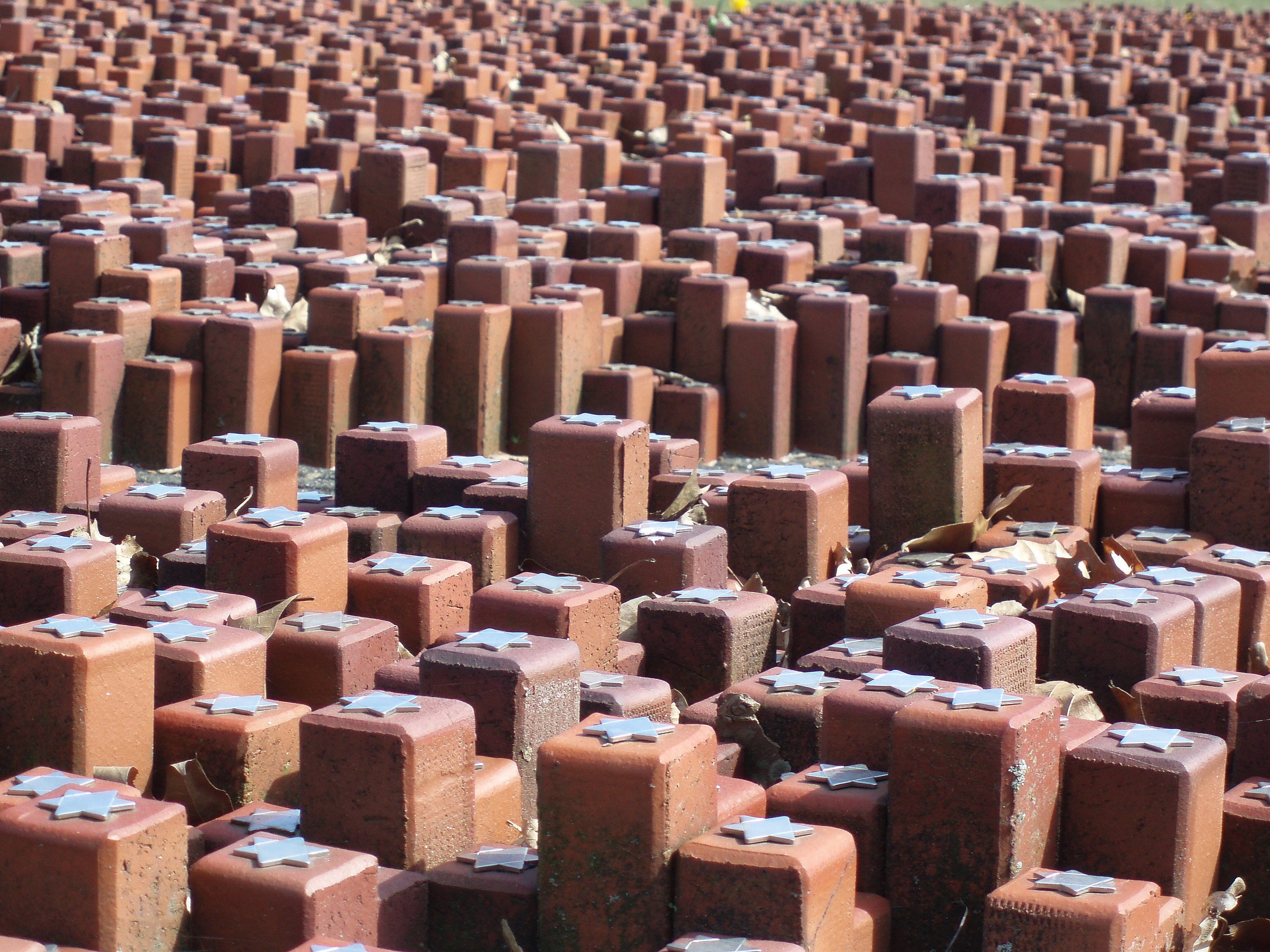 Monument van de 102.000 stenen in Voormalig Kamp Westerbork.